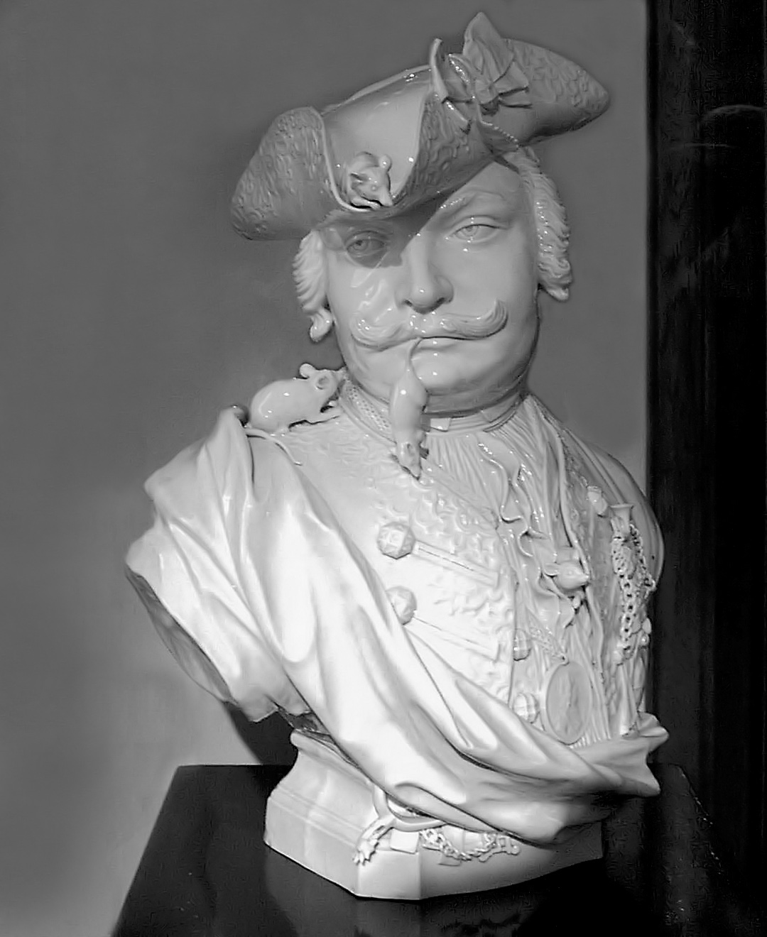 Meissenporzellan, Johann Joachim Kaendler: Büste des Gottfried Schmiedel, 1739